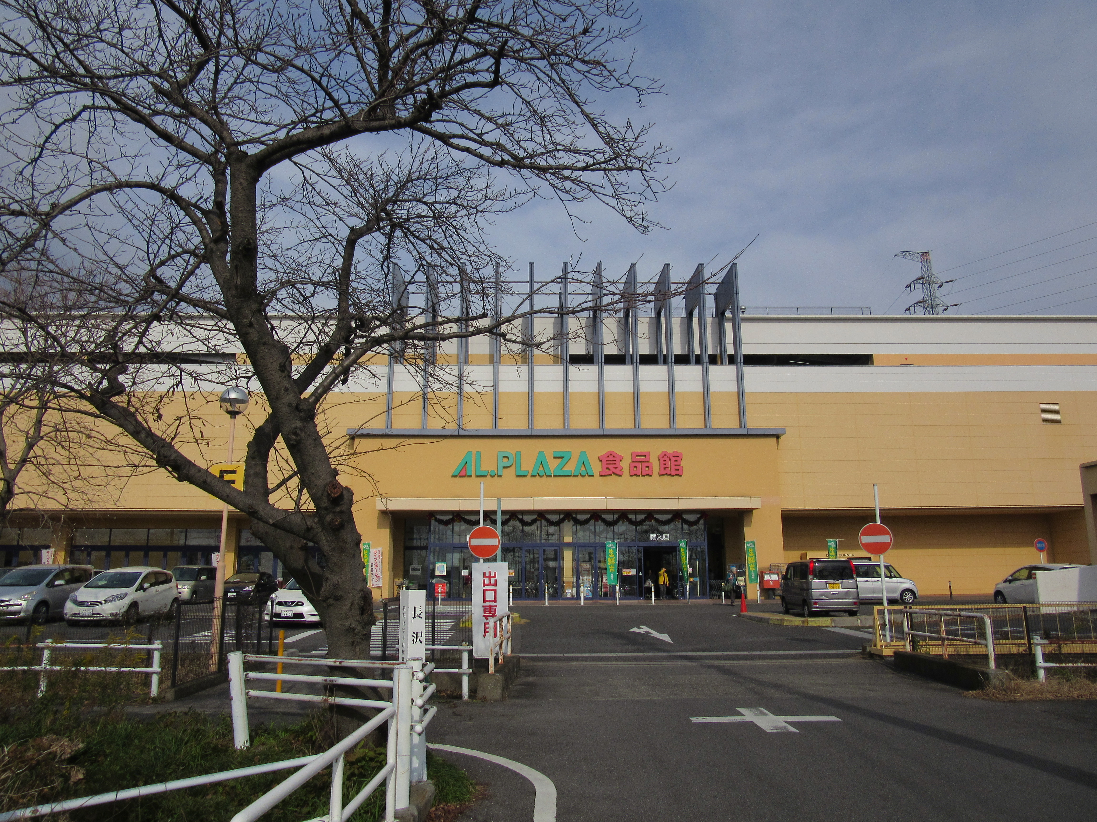 アルプラザ鶴見 Canon PowerShot SX600 HS